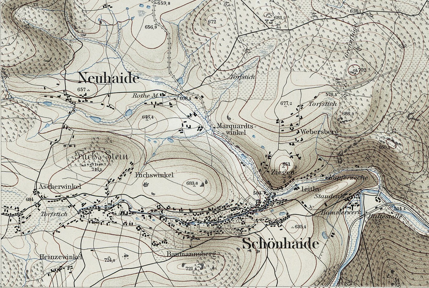 Schönheide im Erzgebirge: Ausschnitt aus Blatt 136 - Section Schneeberg - einer 1:25.000-Karte aus dem Jahr 1876, bearbeitet im topographischen Bureau des königlichen Generalstabs (Königreich Sachsen) Link zum Digitalisat in der Staats- und Universitätsbibliothek Dresden